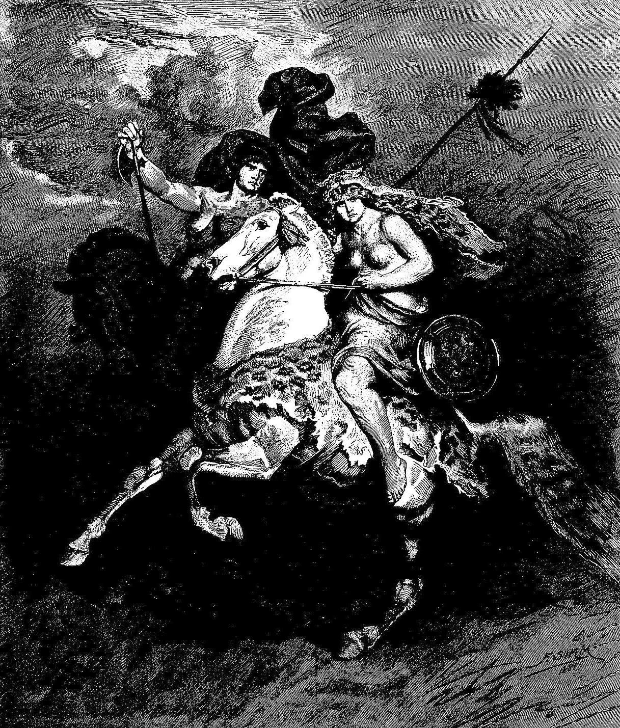 Amazons